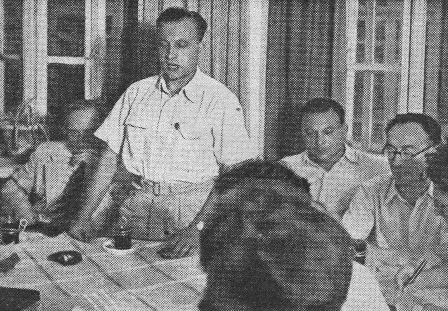 דוד פרנקפורטר מדבר במסיבת עיתונאים בתל אביב, עם עלייתו לארץ, 1945.